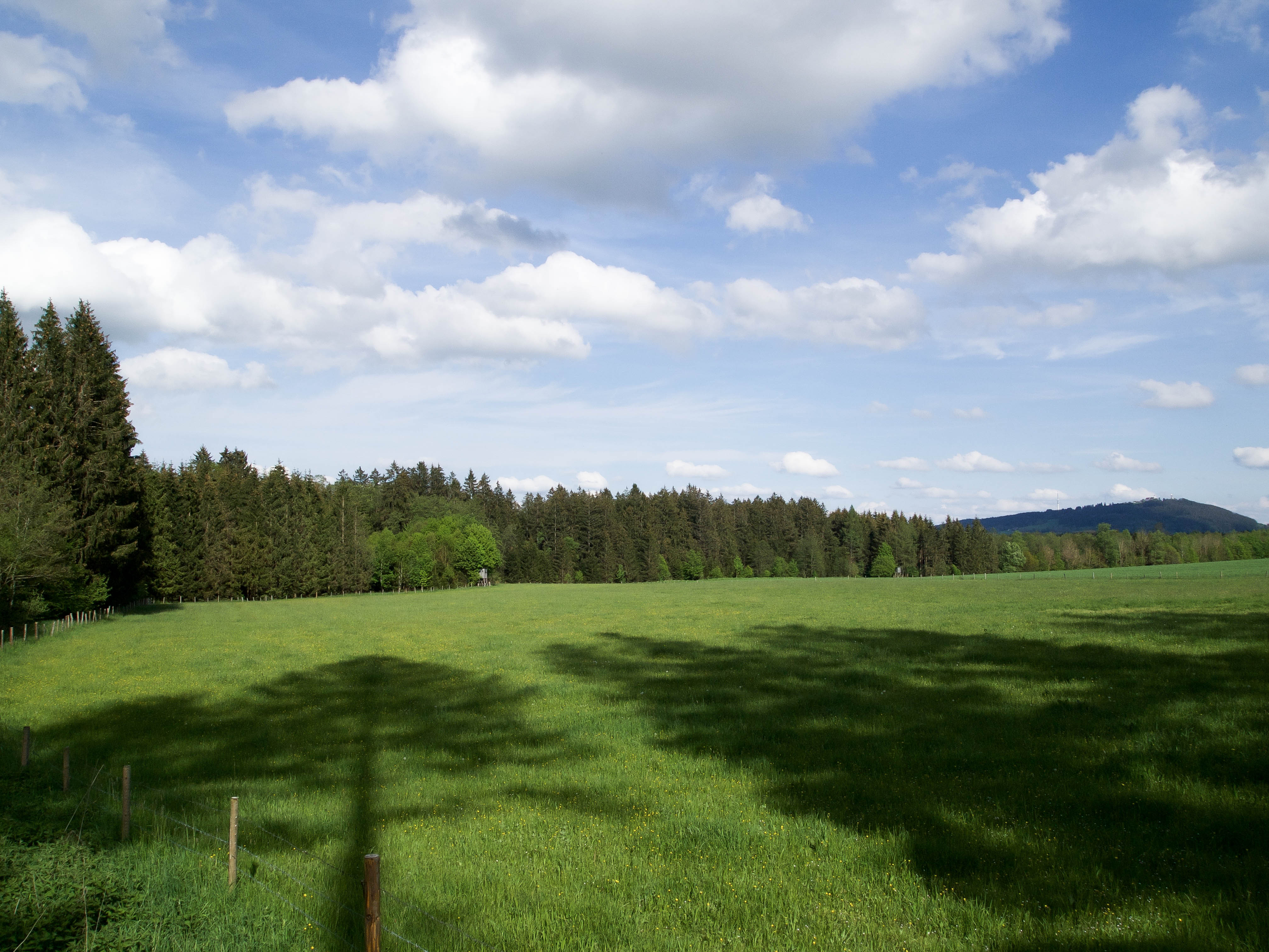 Blick von Westen auf das Waldstück Oberoblander Filz bei Herzogsägmühle (Ortsteil von Peiting), Oberbayern. Rechts im Hintergrund der Hohe Peißenberg. (NSG:BY-NSG-00032.01 Oberoblander Filz)